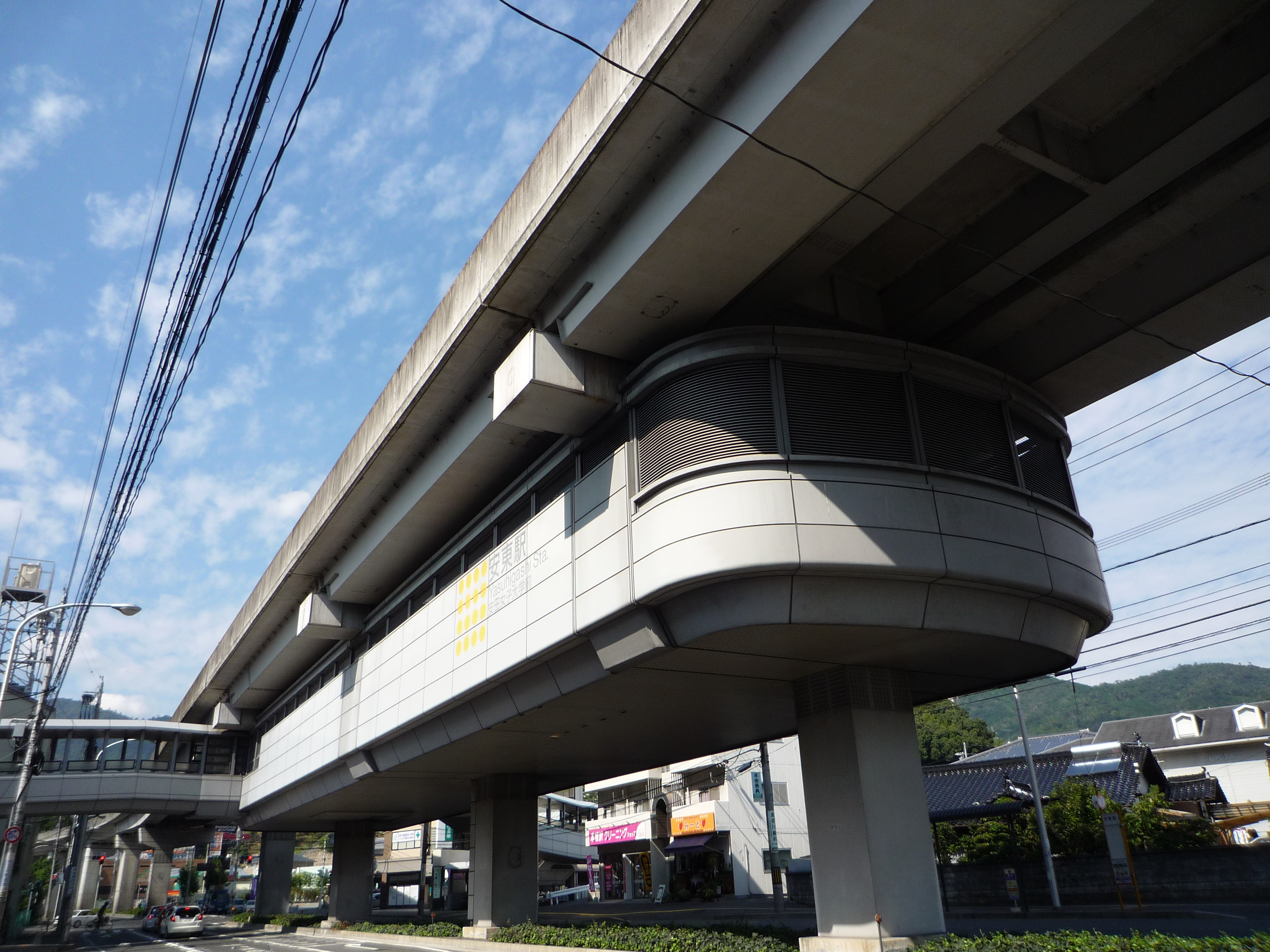 安東駅